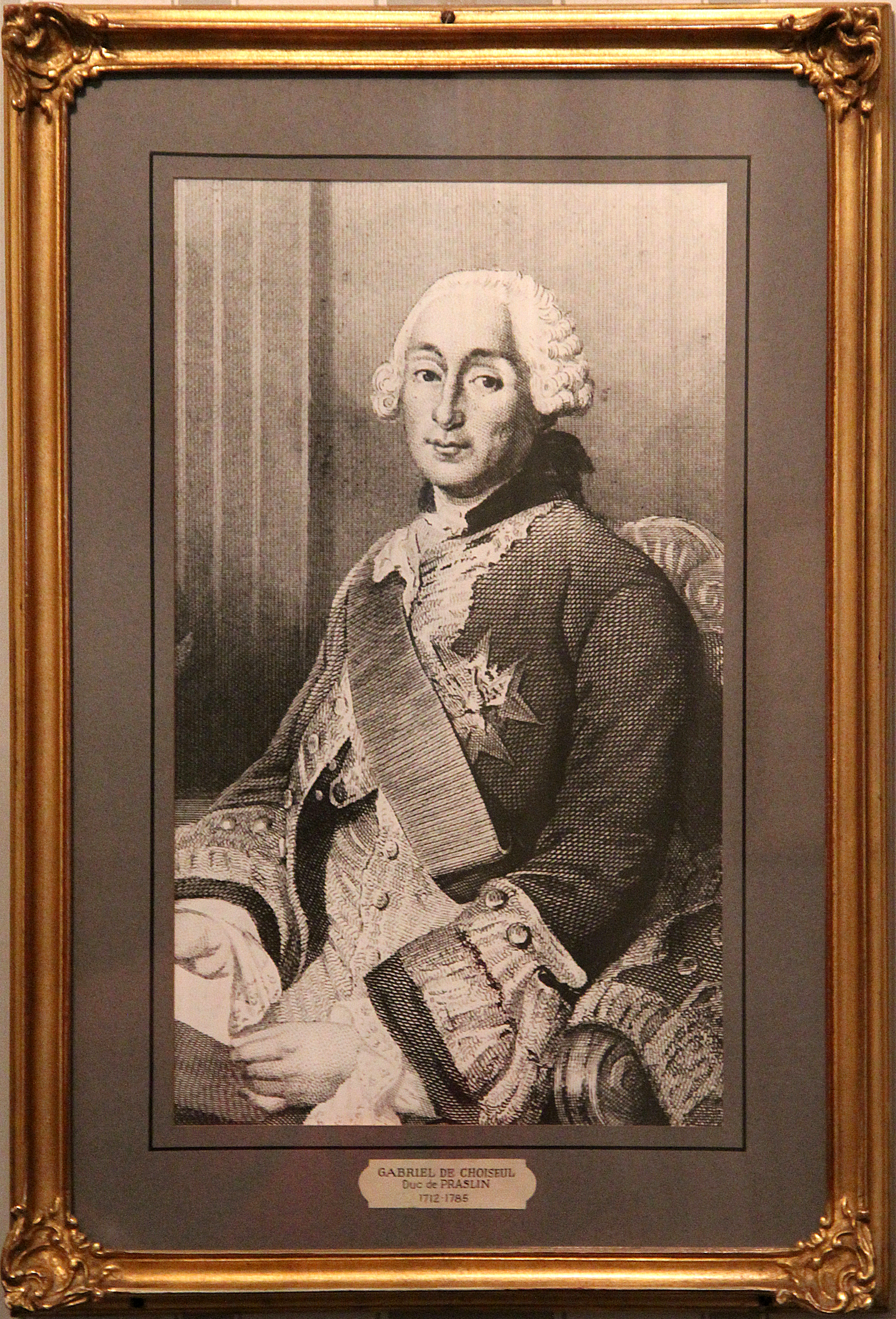 Gravure en taille-douce représentant le duc César Gabriel de Choiseul-Praslin réalisée par François-Anne David d’après Alexandre Roslin, faisant partie des collections du château de Vaux-le-Vicomte - Maincy (Seine-et-Marne, France).